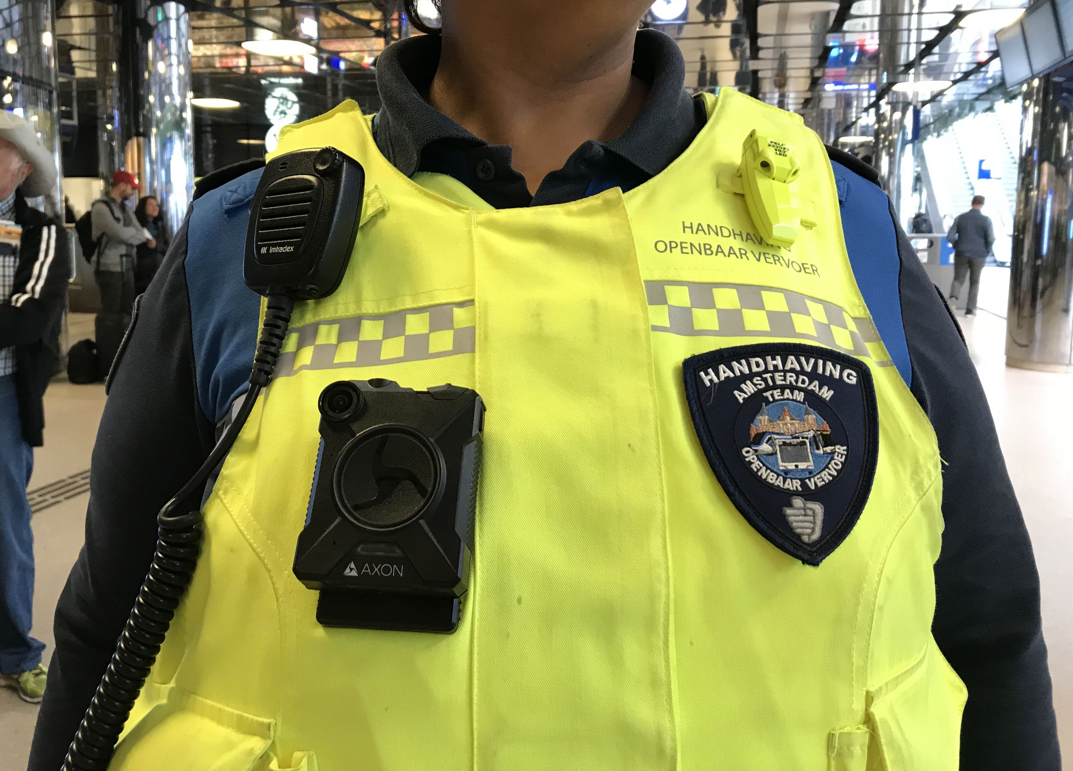 Handhaver openbaar vervoer van gemeente Amsterdam met bodycam op Centraal Station Amsterdam